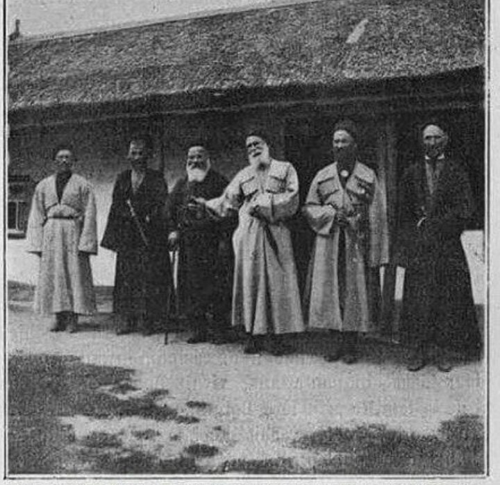 Бжедугские князья в ауле Лакшукай. Конец XIX века